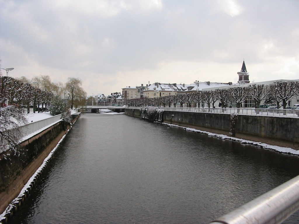 La Meurthe en hiver à Saint-Dié-des-Vosges, vue du pont d'Arlon